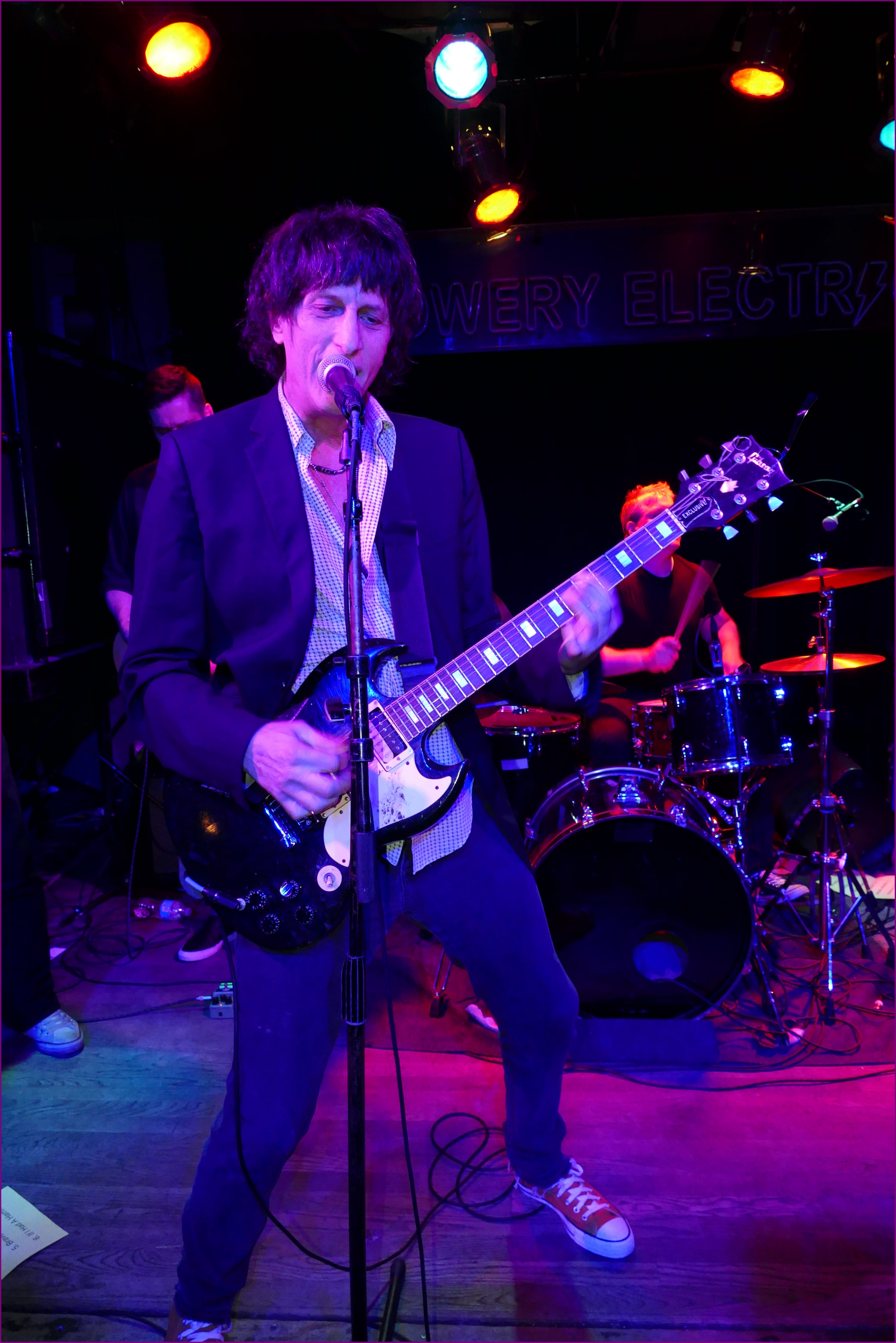 El músicos estadounidense Mickey Leigh en concierto. (2017)